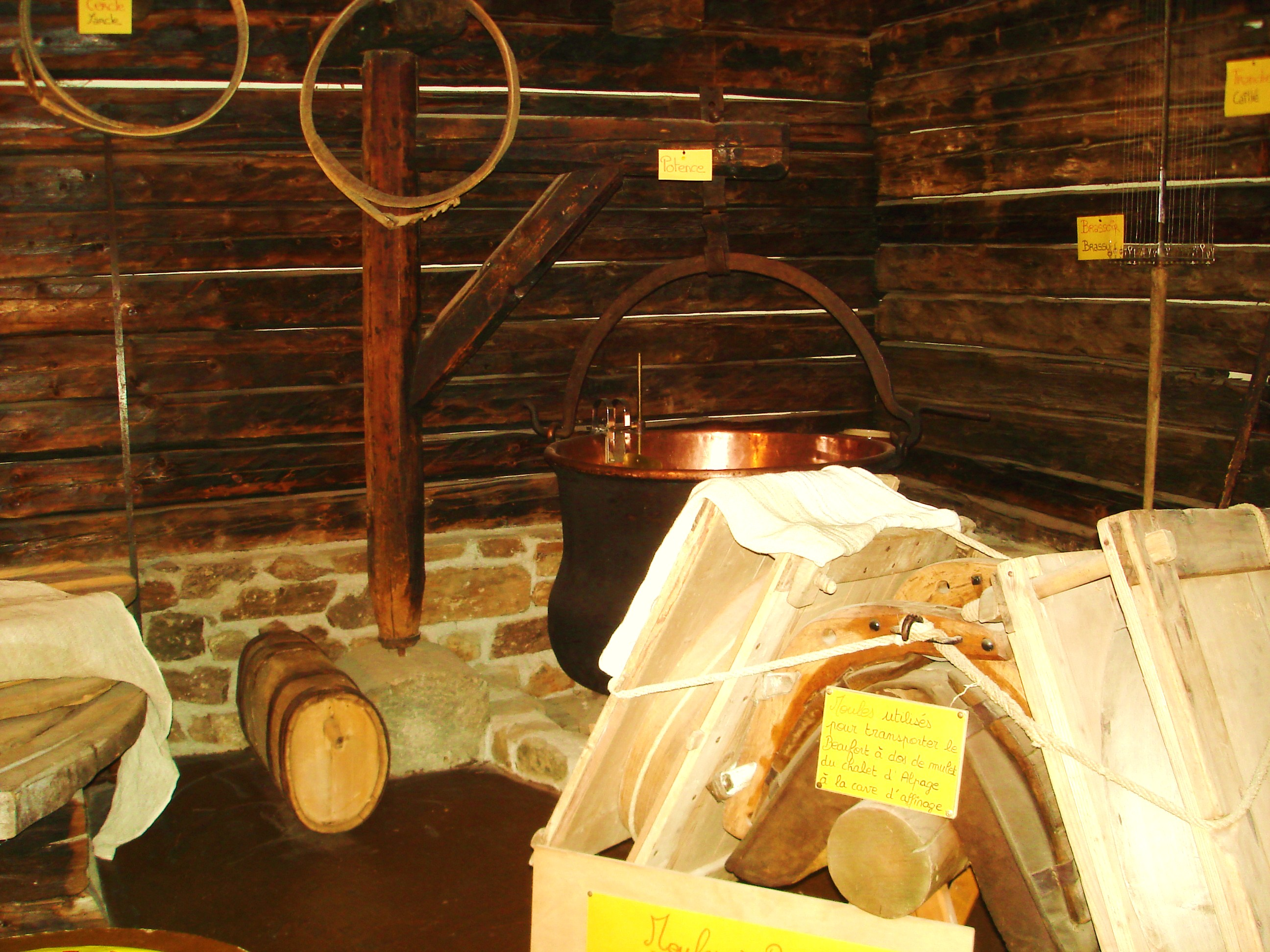 Photo du musée du fromage à Beaufort-sur-Doron : Au premier plan, moules utilisés pour transporter le beaufort à dos de mulet, du chalet d'alpage à la cave d'affinage. Au second plan marmite de cuivre servant à chauffer le lait.